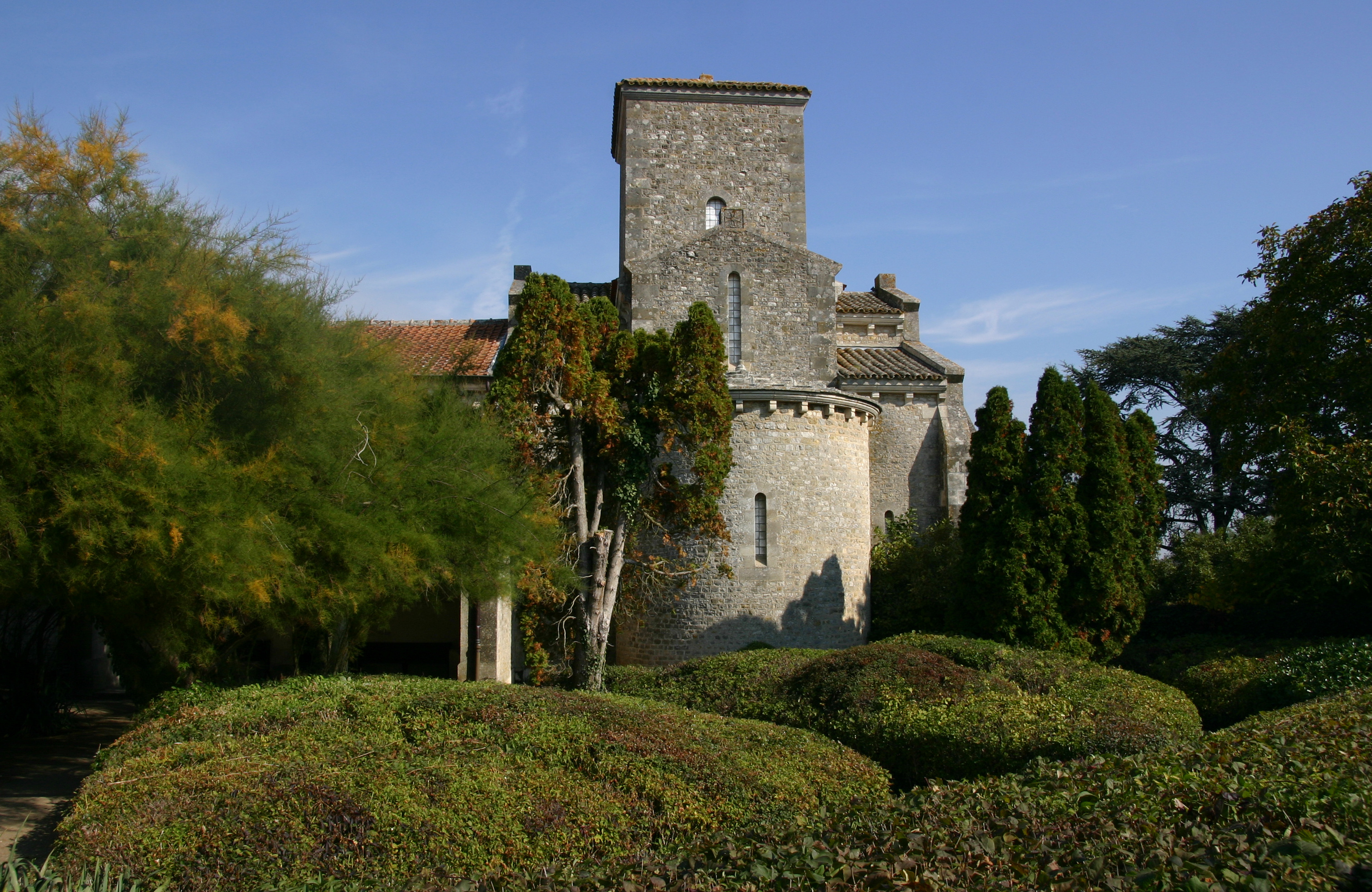 Kirche der Heiligsten Dreifaltigkeit in Germigny-des-Prés